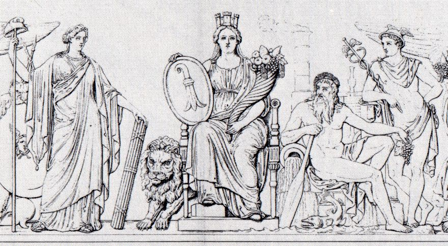 Ausschnitt aus dem Mittelfeld des Figurenfrieses am Museum an der Augustinergasse in Basel von 1849. Die Stadtgöttin Basilea hat den Flussgott Rhenus neben sich und ist umgeben von der Libertas als Allegorie der politischen Freiheit und Merkur als Gott der Kaufleute. Rechts hinter ihr befindet sich ein rauchender Schornstein. Basilea erscheint so als Patronin von Handel und Industrie der Bürgerstadt Basel. Zeichnung von J. Neidhardt.